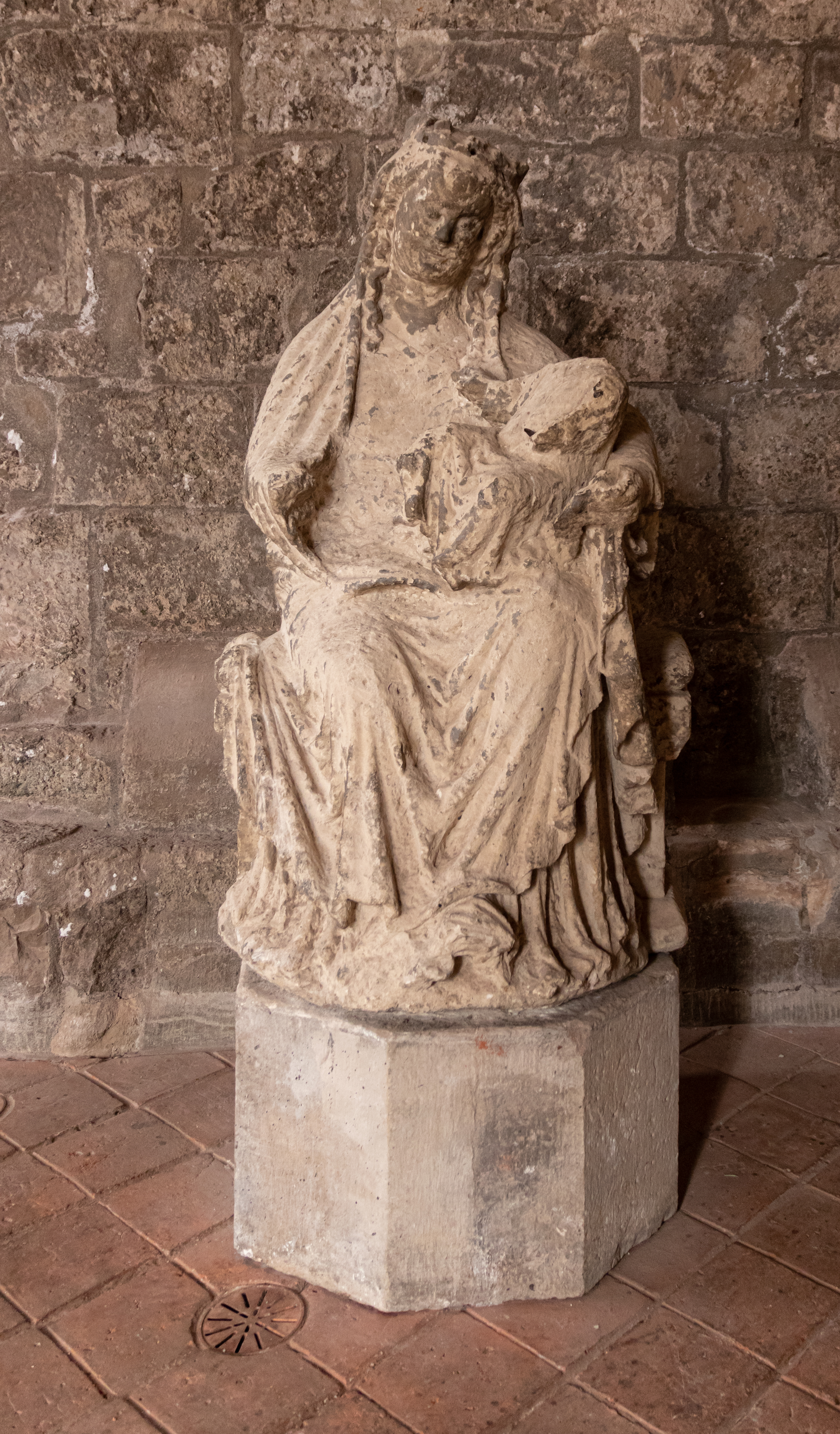 Kloster Walkenried – Madonna